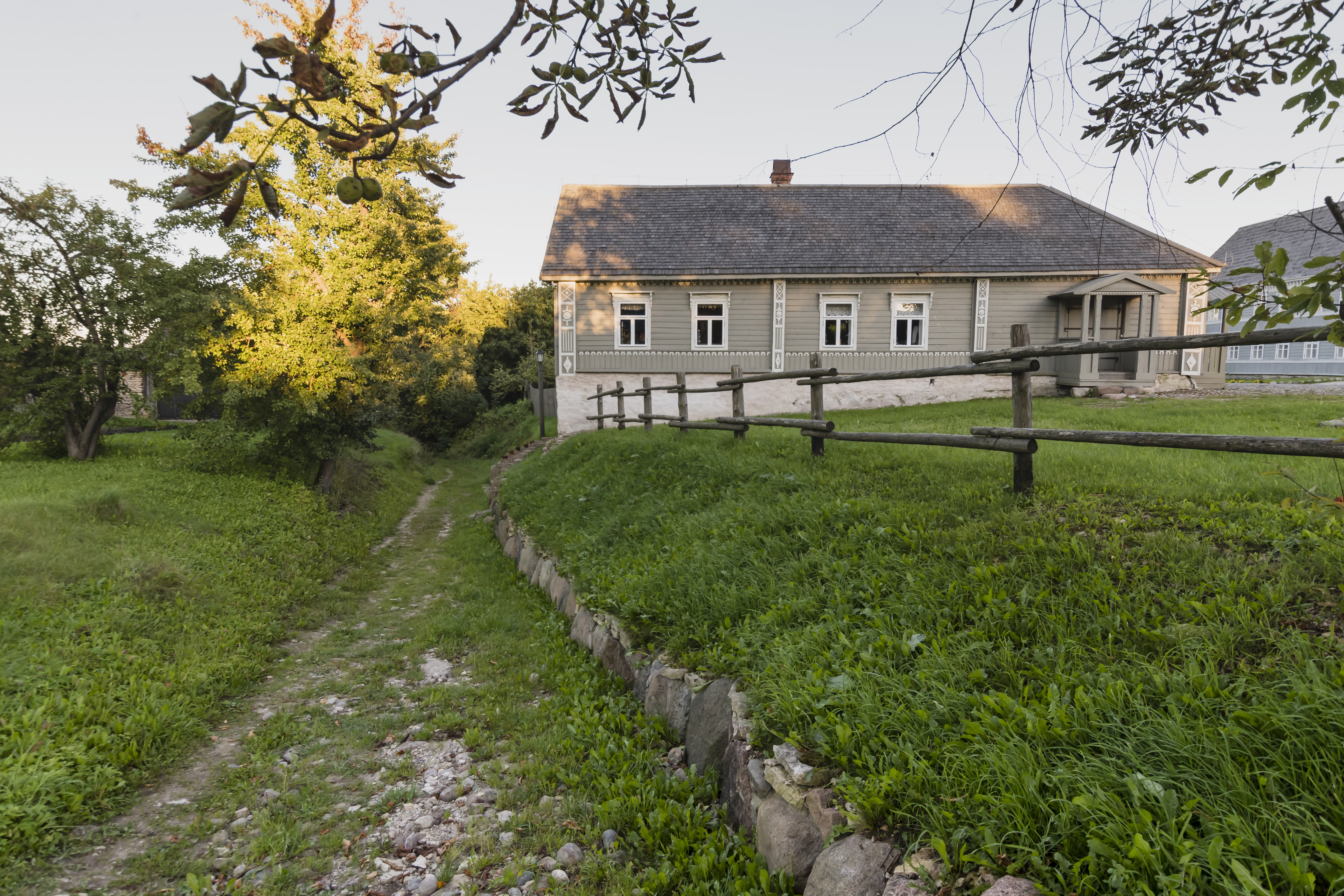 Печорская улица. Изборск Псковская обл. Россия. 181518